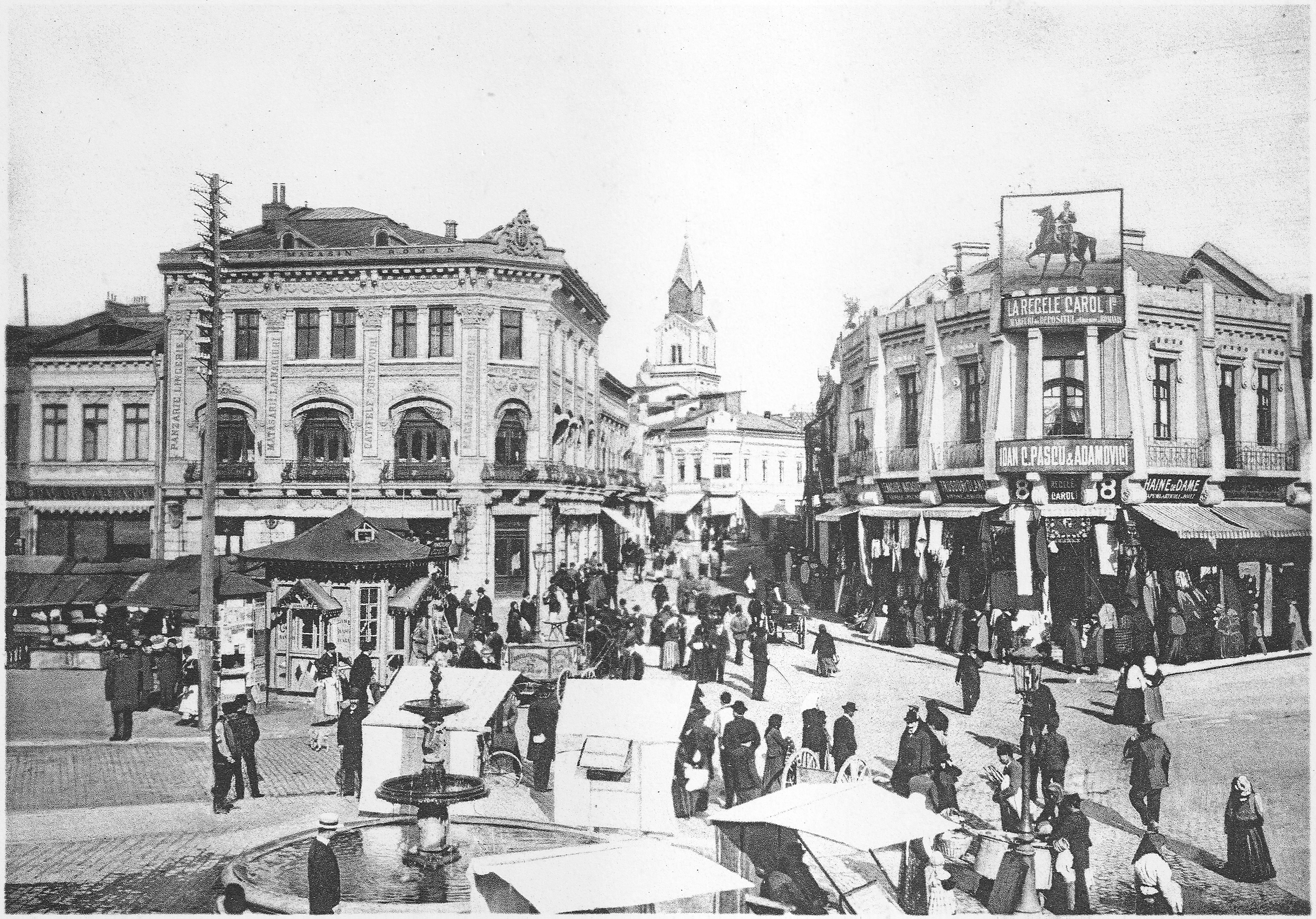 Piaţa Sf. Anton, Bucharest